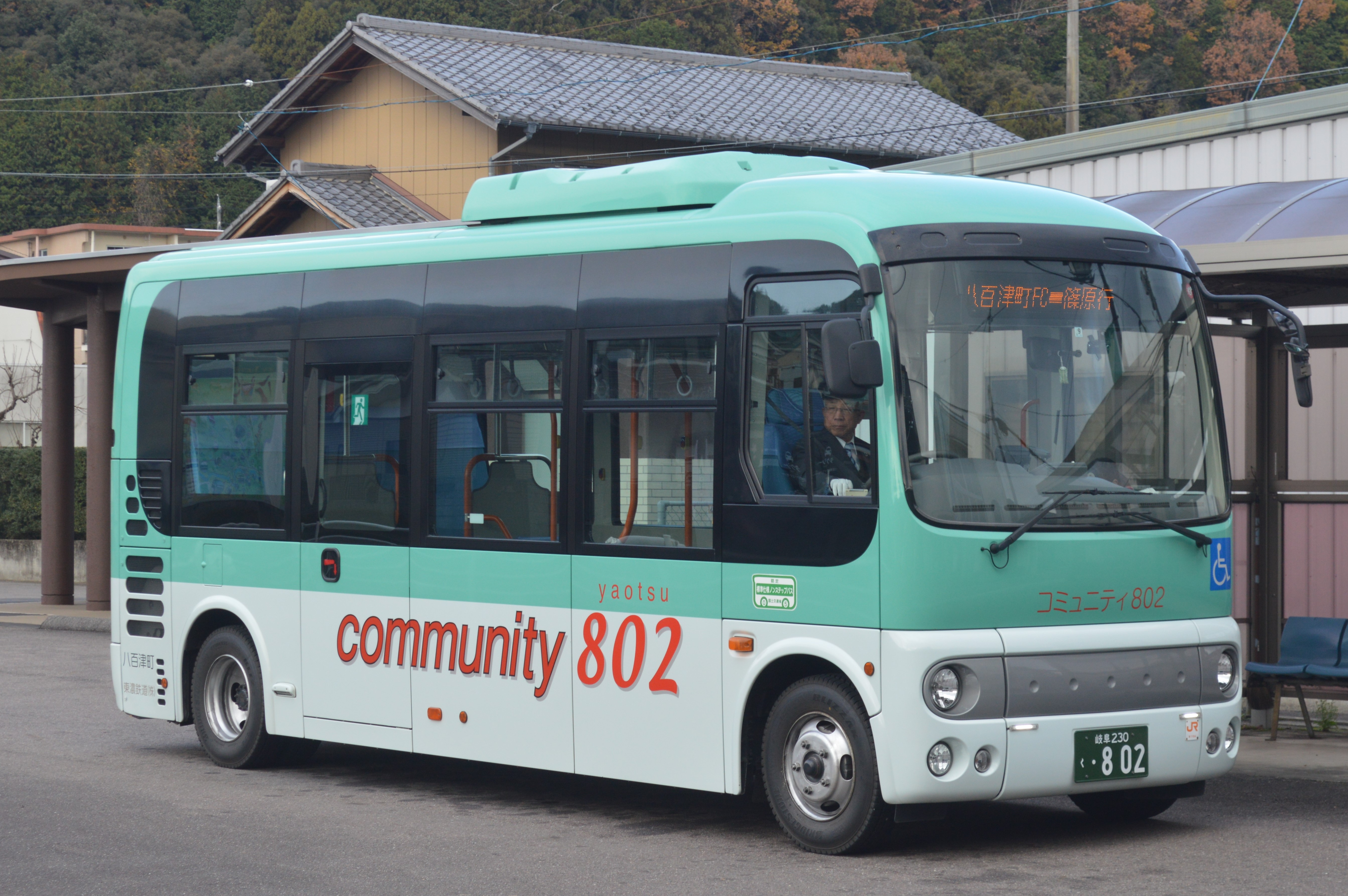 コミュニティバス802。岐阜県加茂郡八百津町の八百津町ファミリーセンターバス停で撮影。